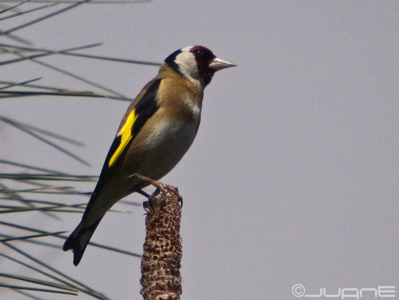 Jilguero (carduelis carduelis parva)